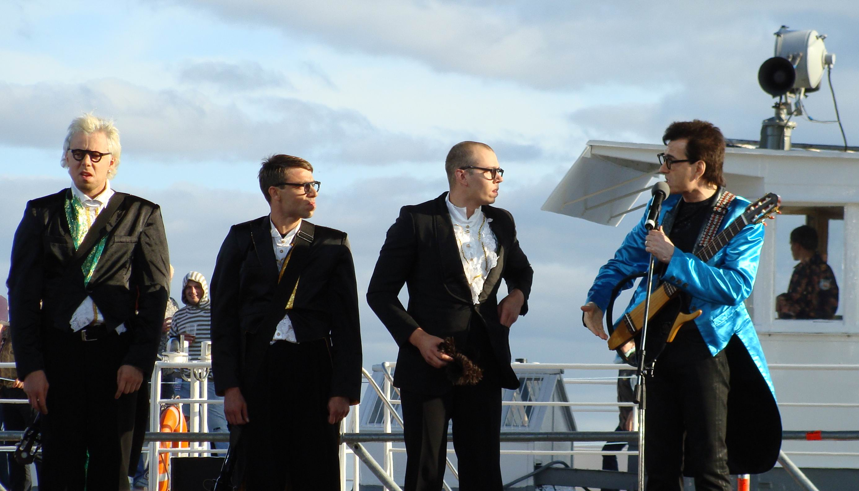 Ветров Геннадий Анатольевич в Архангельске выступает совместно с программой Регины Дубовицкой - "Аншлаг" на юбилее, 425-летии города, в воскресенье, летом 28 июня 2009 года.